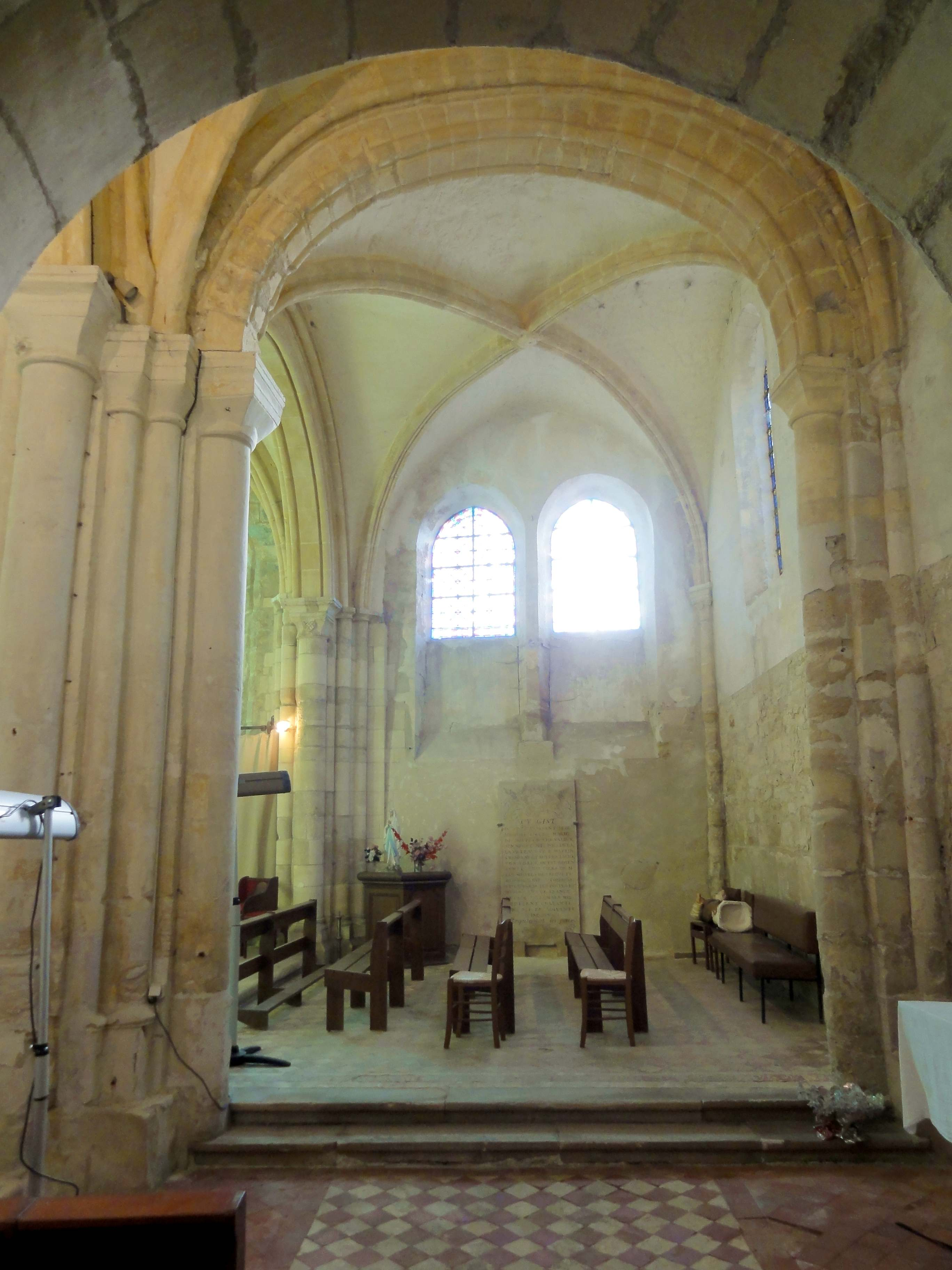 Intérieur de l'église - voir titre.